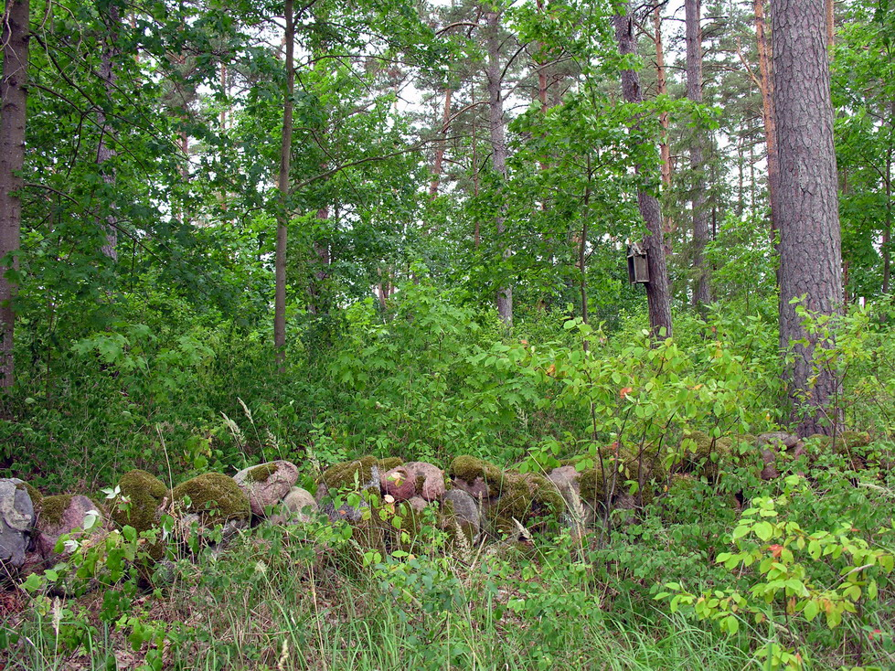 Kegriai, Mažeikių raj., Viekšnių sen. Kegrių kaimo kapinaitės (neveikiančios) Foto: Algirdas, 2006 m. liepos 18 d.